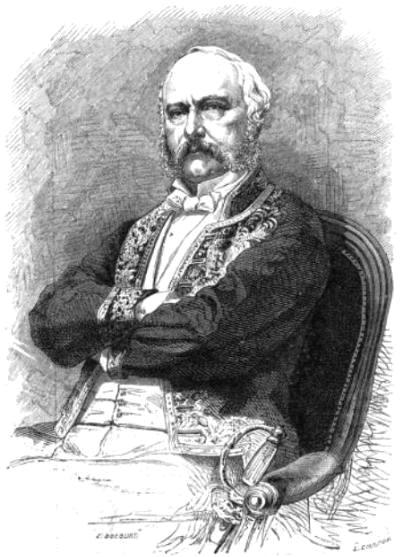 "M. Boittelle, ancien préfet de police, élevé à la dignité de sénateur".